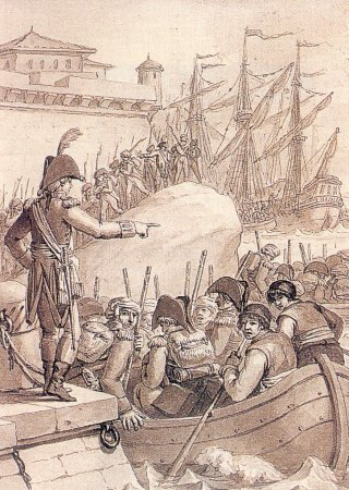 Einschiffung der britischen Truppen beim Rückzug von Walcheren 1809